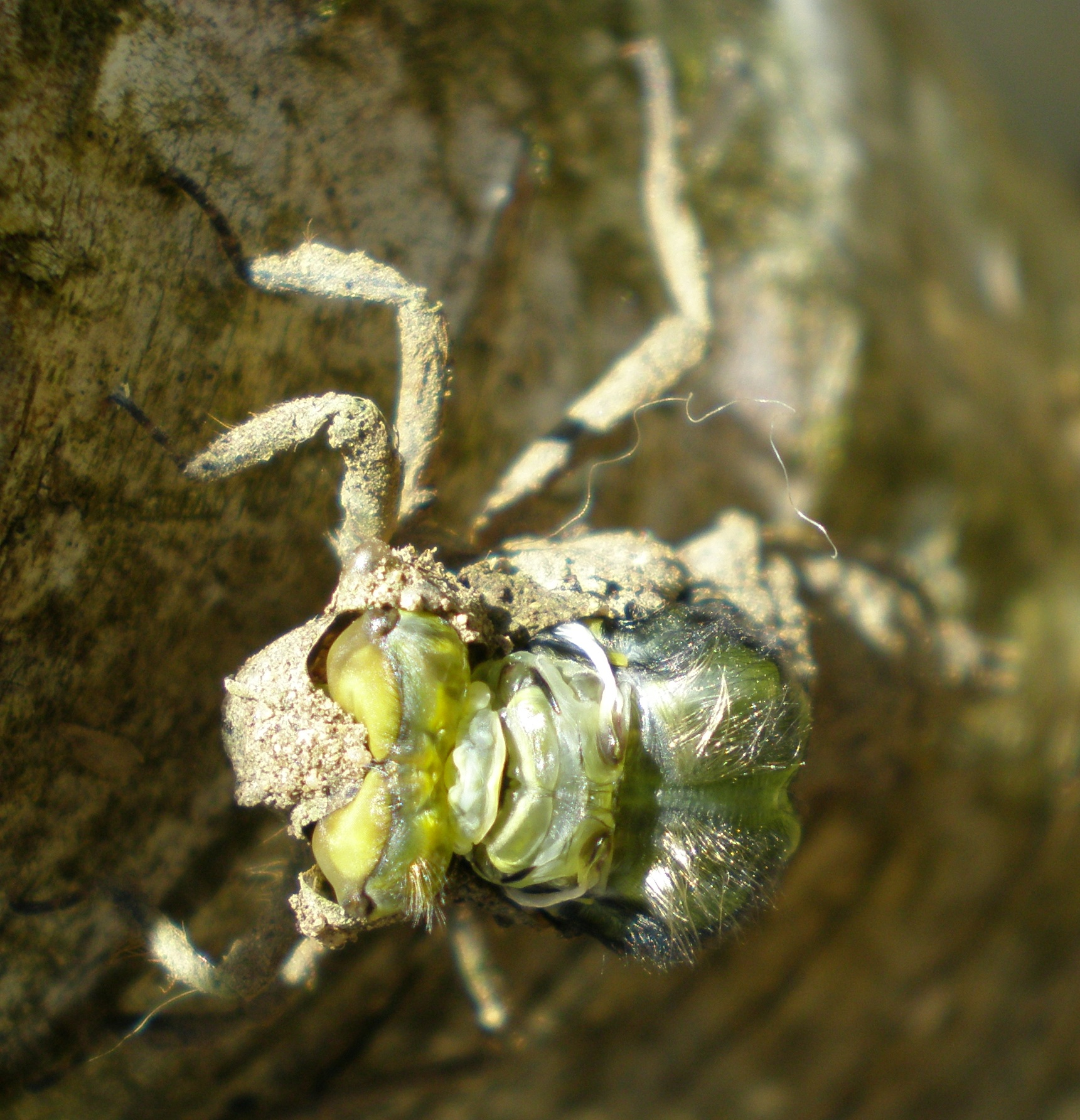 la carapace de la larve sèche, et se déchire.Alors commence un travail qui va durer environ deux heures.